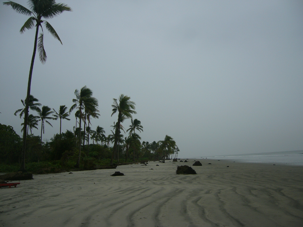 Cyclone signal 7 Kuakata Sea Beach Patuakhali Bangladesh (2)